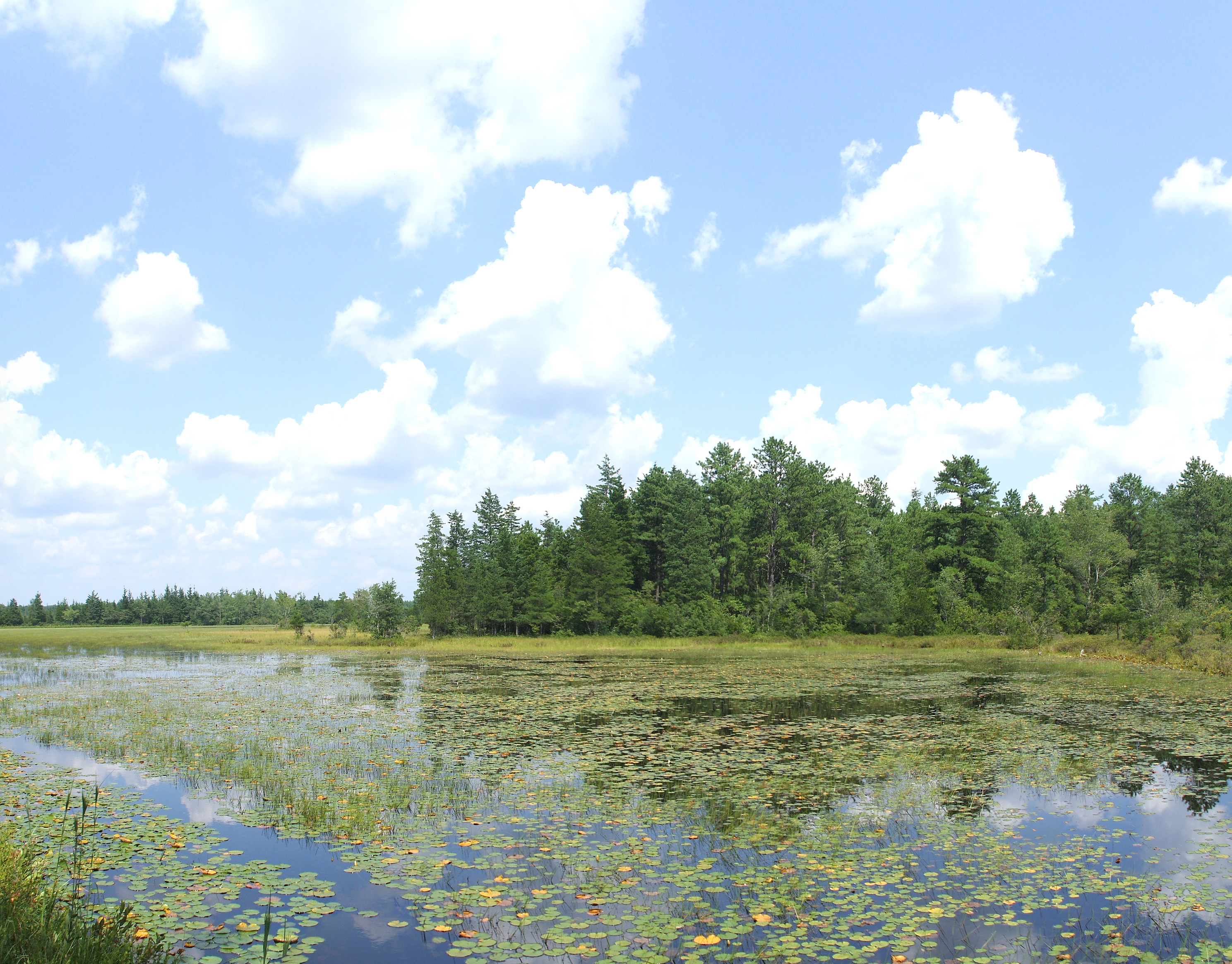 Cranberry Bog Pine Barrens, NJ